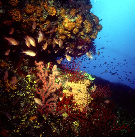 Finistruna, Area Marina Protetta Capo Gallo, Palermo, Sicily Paramuricea clavata, Astroides calycularis, Anthias anthias